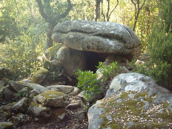 Paradolmen d'en Garcia. Massís de Cadiretes, Tossa de Mar (Girona) Paradolmen identificat per Agustí García l’any 1974. La cambra sepulcral està formada per un bloc erràtic a ponent i amb la penya natural a llevant. La coberta es troba falcada per petits blocs erràtics i paret de pedra seca, i amida 2'60 per 2'40 m. i 0'70 de gruix. L'entrada es devia efectuar a través d'un curt corredor, conservat només en part i és orientada al sud. La cambra amida 2'20 m. de llarg per 1 d'ample i 0'90 d'alçada màxima. Fou excavat l'any 1979 i pel tipus arquitectònic es pot datar entre el 2500 i el 2200 aC.